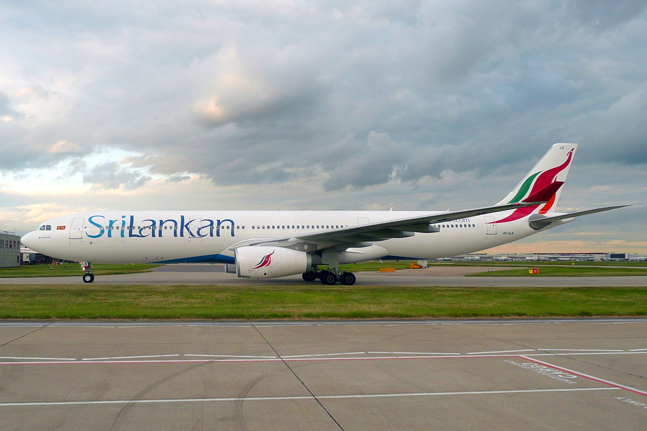 4R-ALN22052015LHR